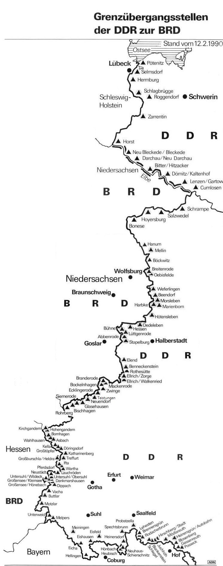 Übergänge an der innerdeutschen Grenze, einschließlich der nach der "Grenzöffnung" November 1989 zusätzlich neu geschaffenen Übergange.